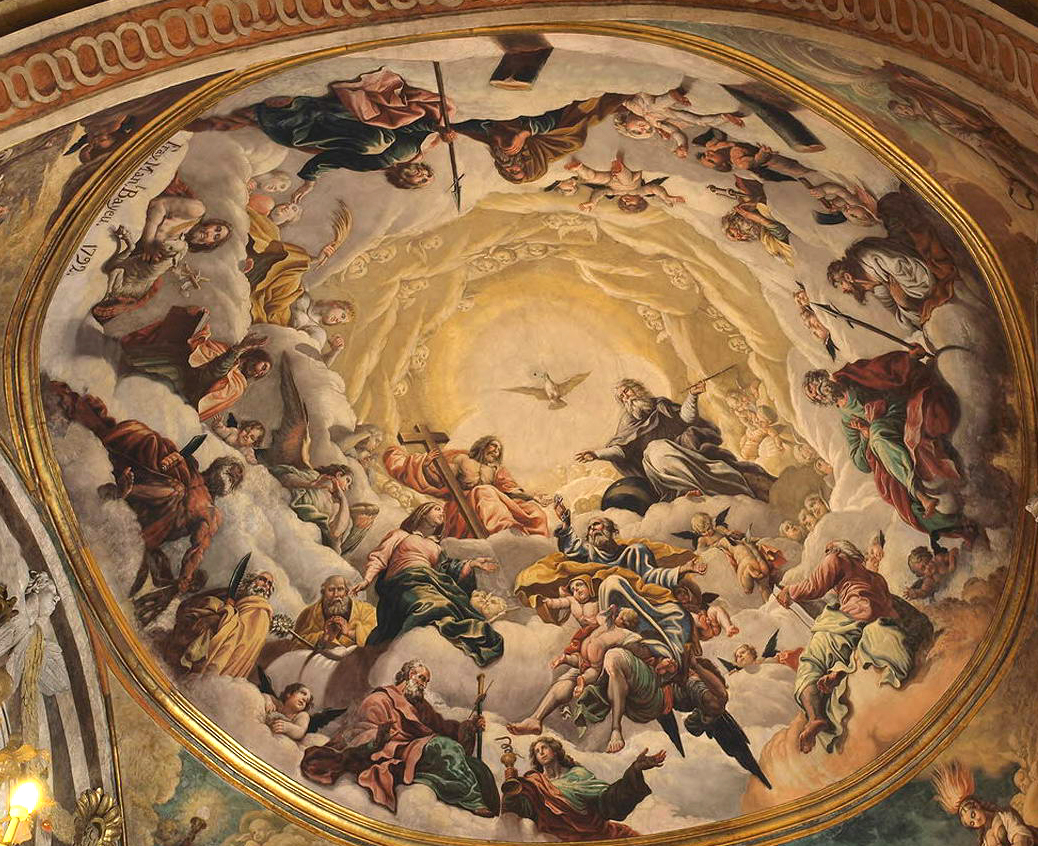 Fresco de la cúpula rebajada del ábside nuevo de la catedral de Jaca, pintado por fray Manuel Bayeu (1792)